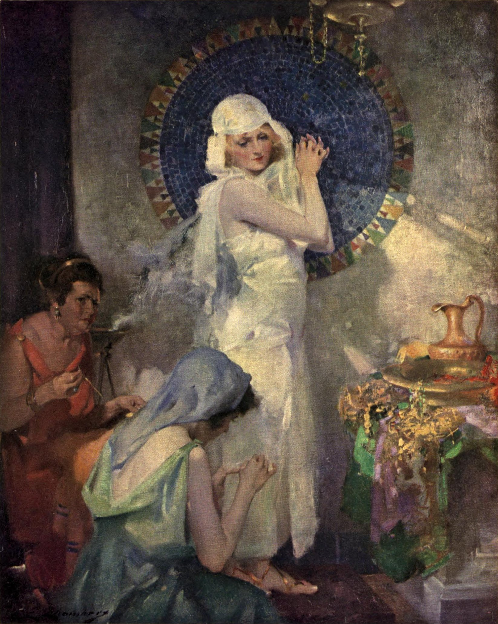 La mariée